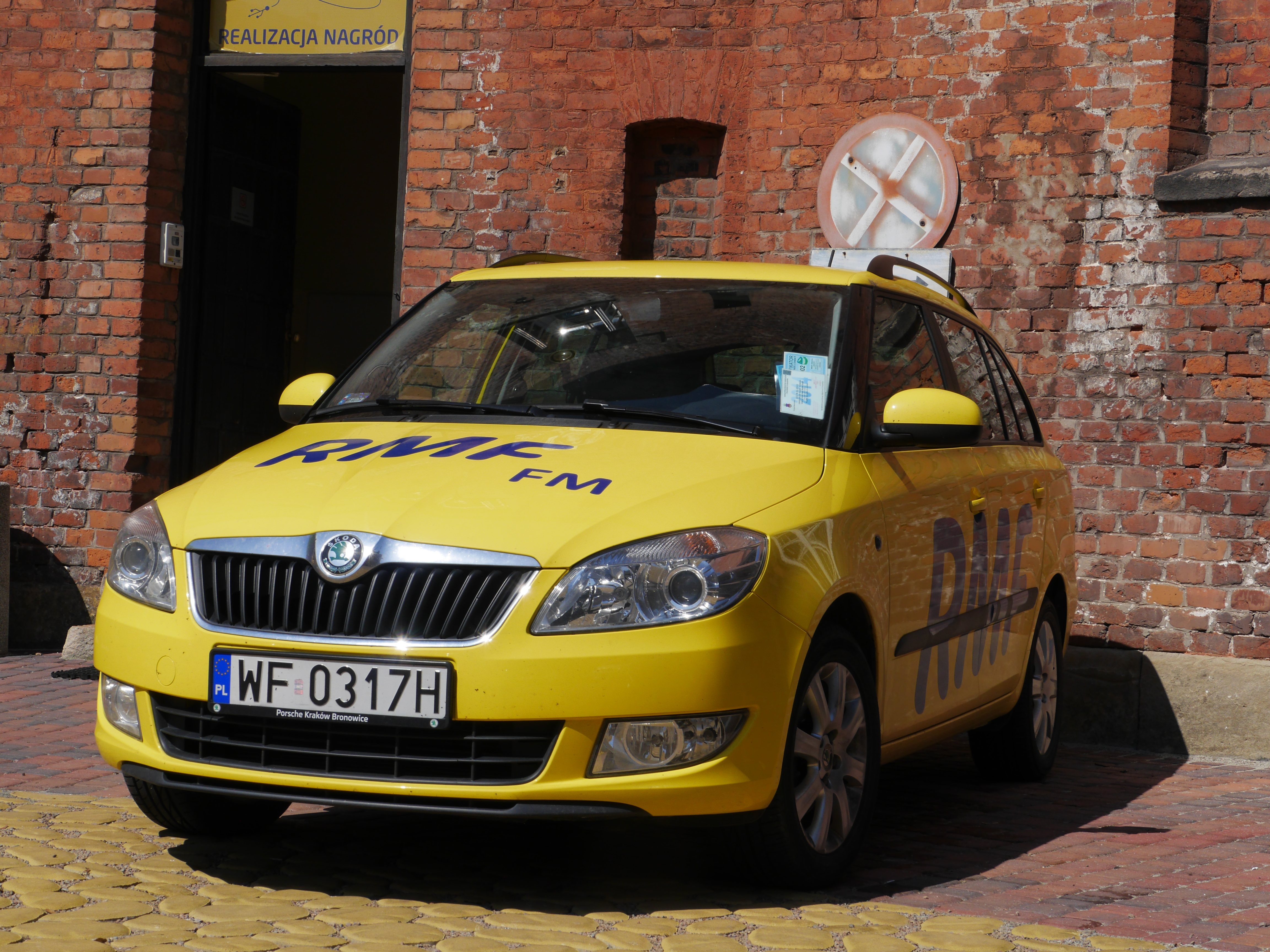 Siedziba radia RMF FM, al. Waszyngtona 1, 30-204 Kraków This photo was taken with Panasonic Lumix DMC-GH3 camera, thanks to Panasonic. You can see all photographs in category: Taken with Panasonic Lumix DMC-GH3.